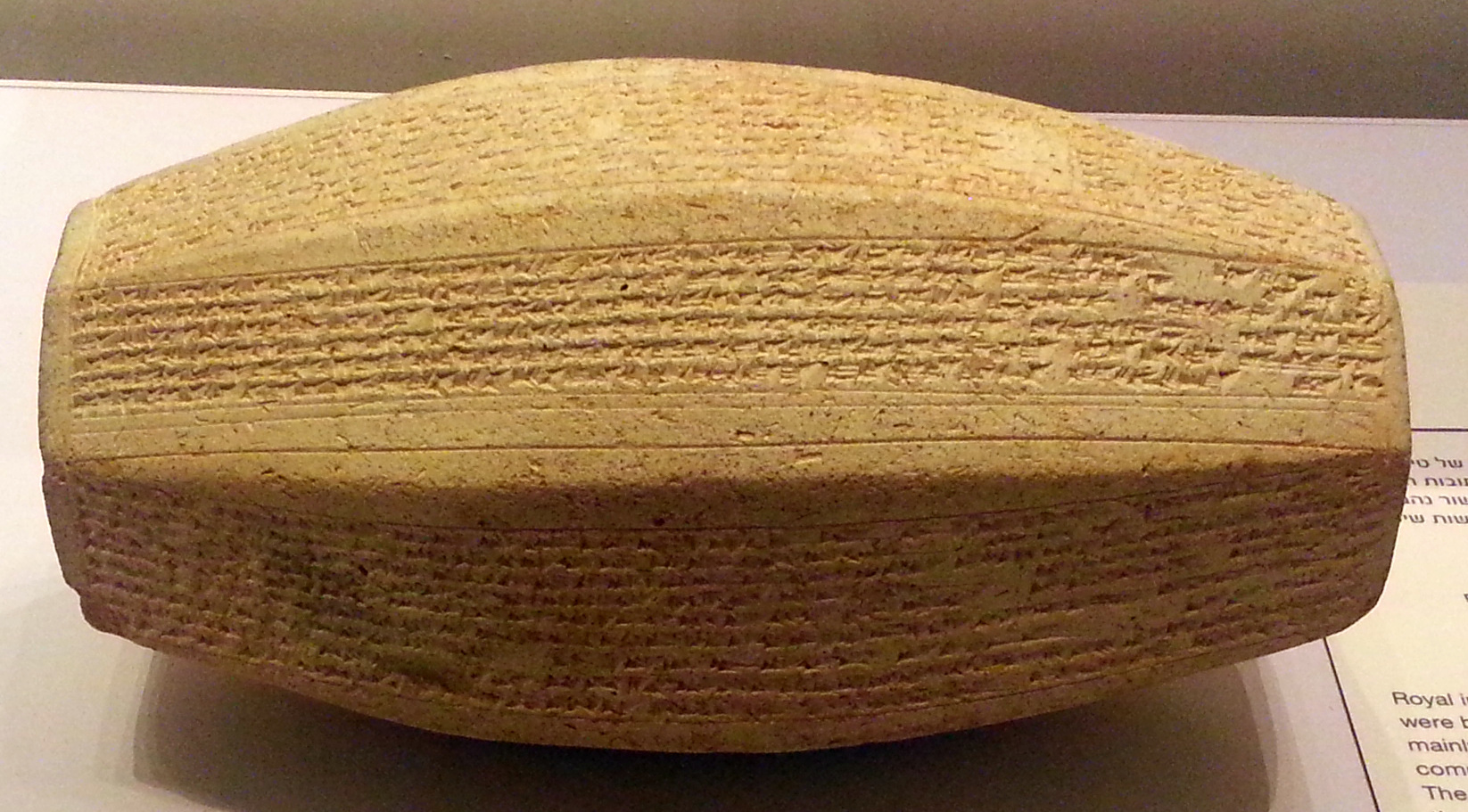 גליל המלך סרגון השני. נמצאה בדור שרוכין; פריט בתצוגת מוזאון ישראל בירושלים Similar to, or the same as, Barillet : document de fondation de la ville de Dûr-Sharrukên par Sargon II d'Assyrie from the Louvre.